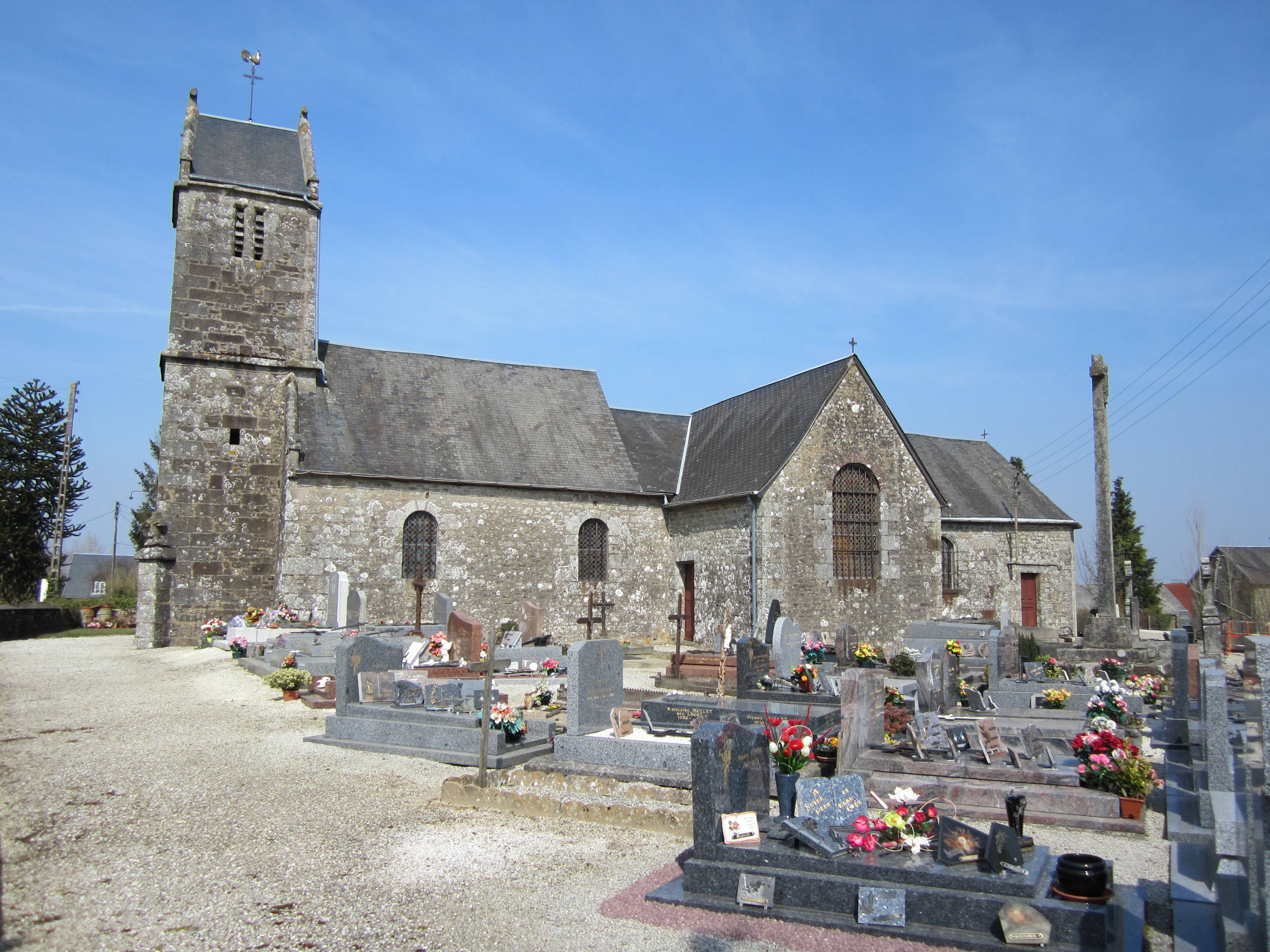 Église Saint-Pierre de Boisyvon